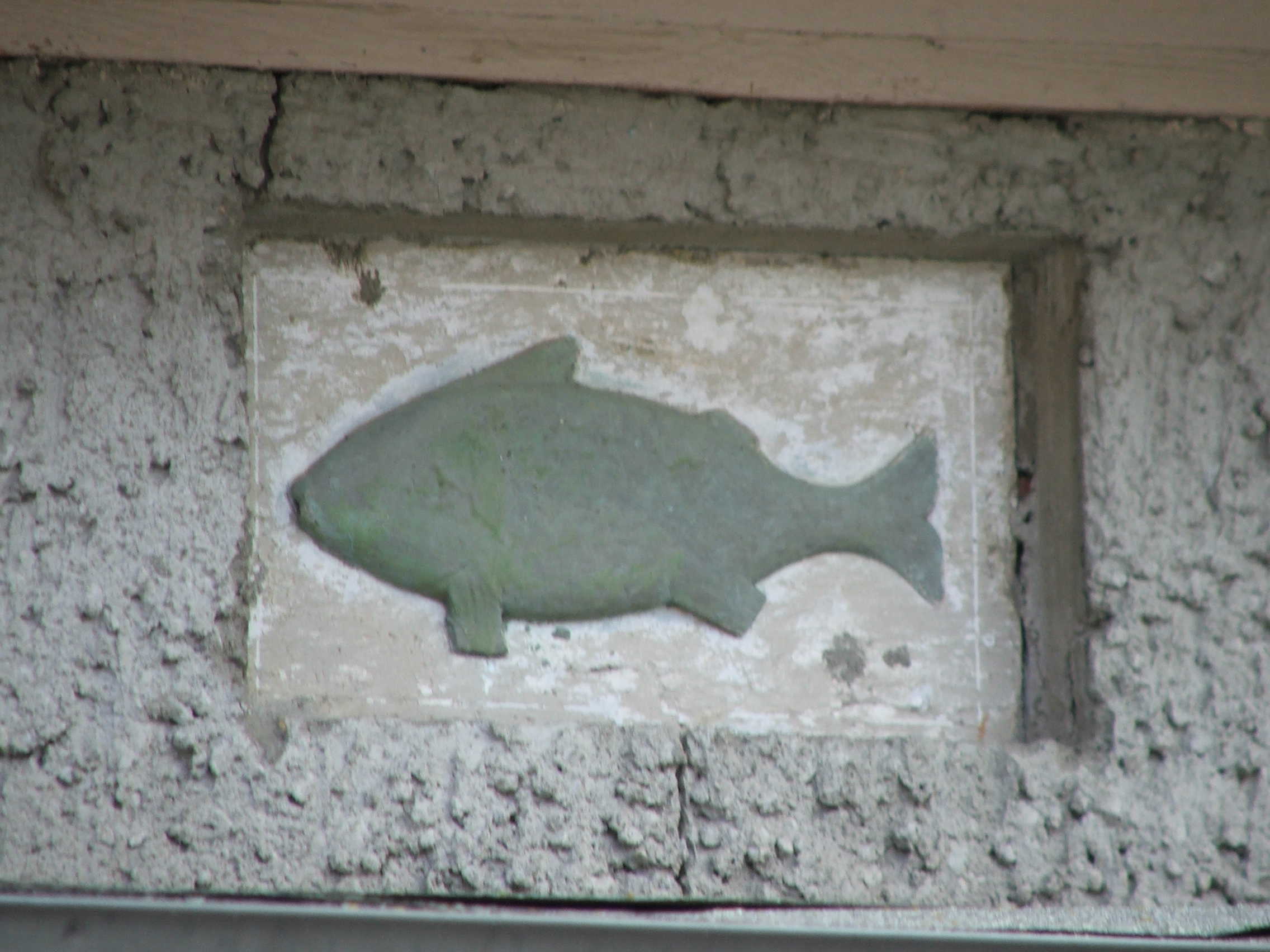 Fischerzeichen an Haus in der Fischergasse, ehemals Stadtwinkel bei Liebenwerda